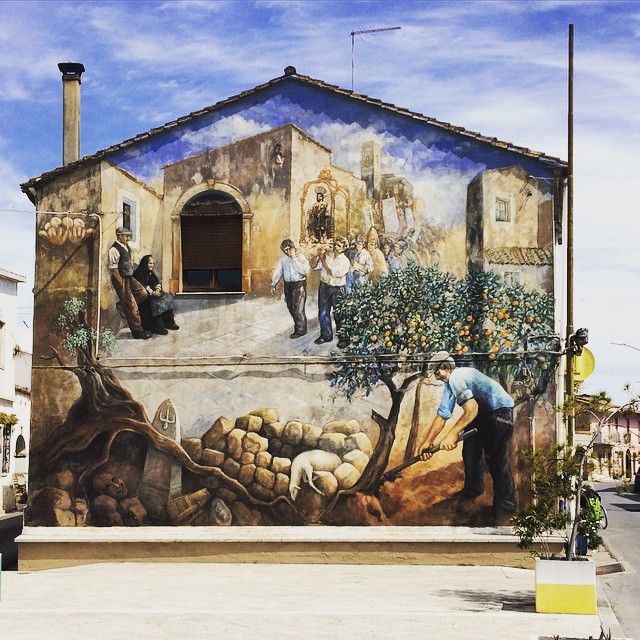 Peintures murales à San Sperate, Sardaigne